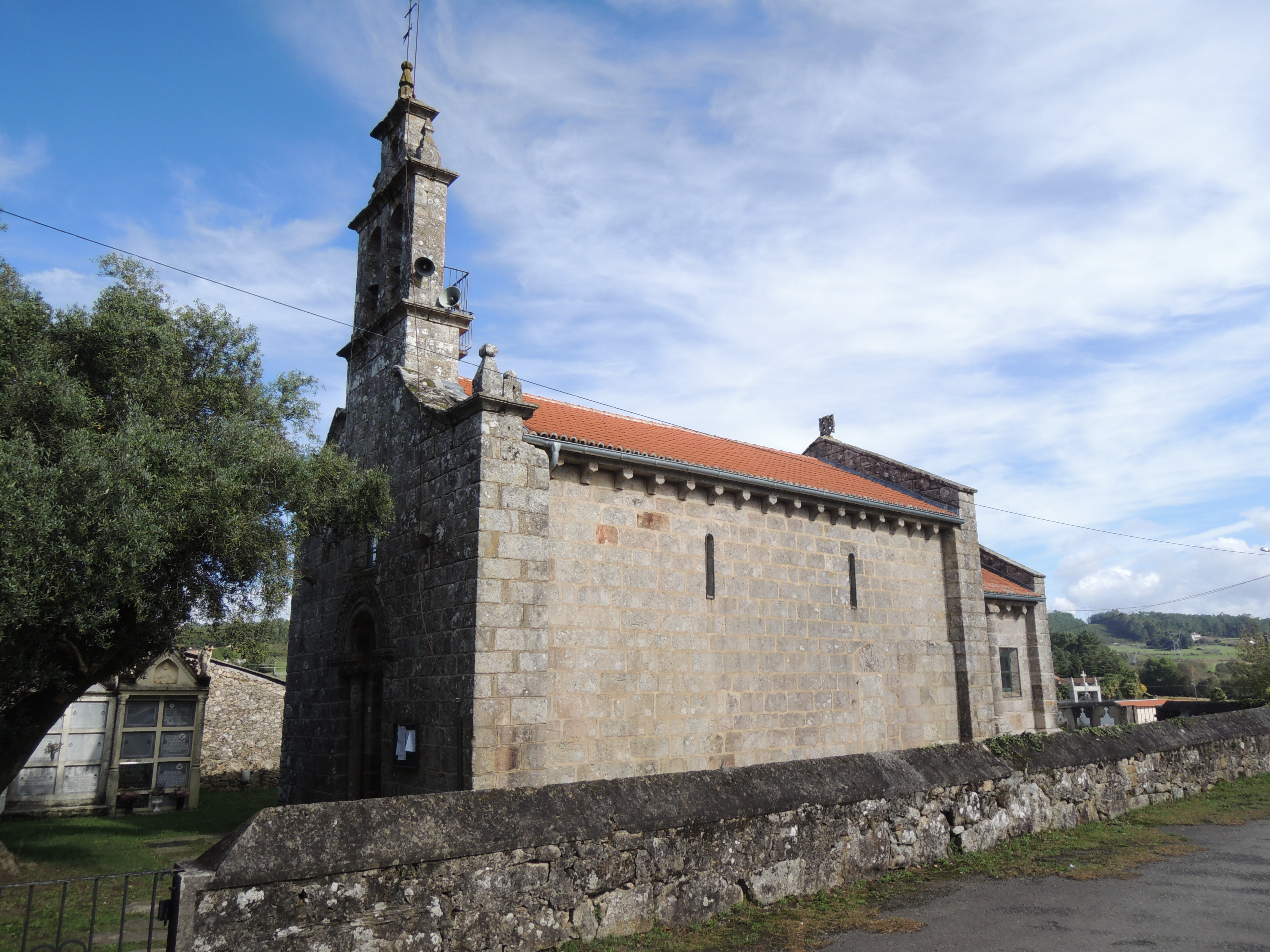 Construida en la segunda mitad del siglo XII, es de planta de nave única y ábside rectangular.